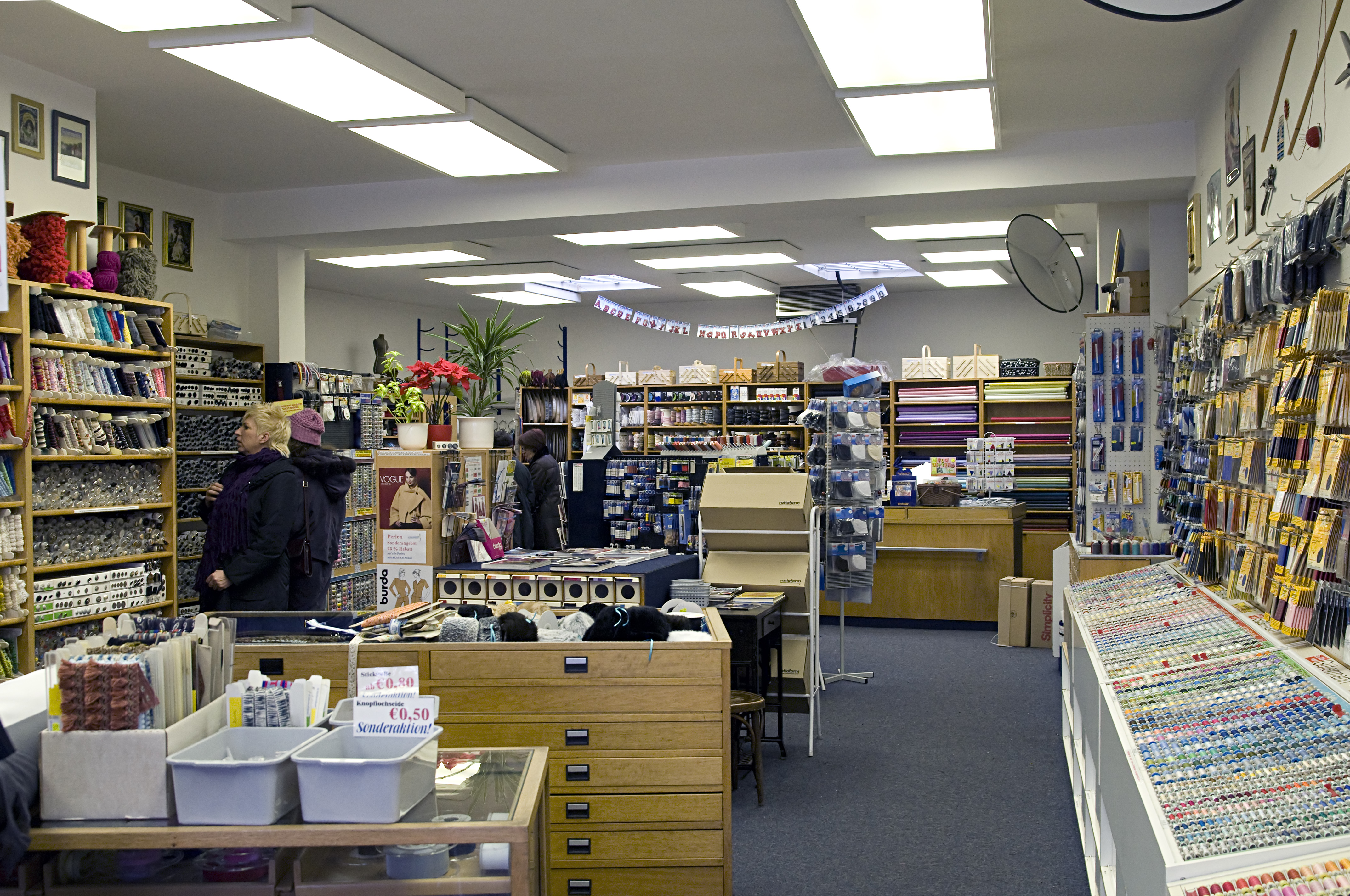 W. Wächtershäuser, Blick in den Laden